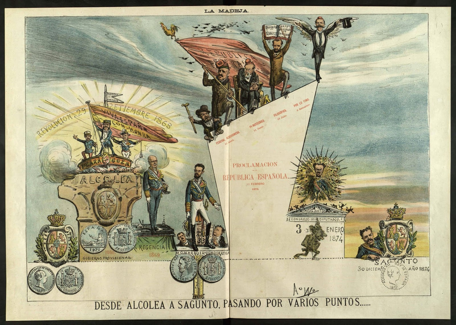 Caricatura sobre las etapas del Sexenio Democrático, desde la revolución de 1868, pasando por el Gobierno Provisional, el reinado de Amadeo I o la Primera República hasta que en diciembre de 1874 el General Martínez Campos aparece restaurando el escudo de la monarquía histórica. Caricatura de «La Flaca» con el encabezado de “La Madeja”, 1874.